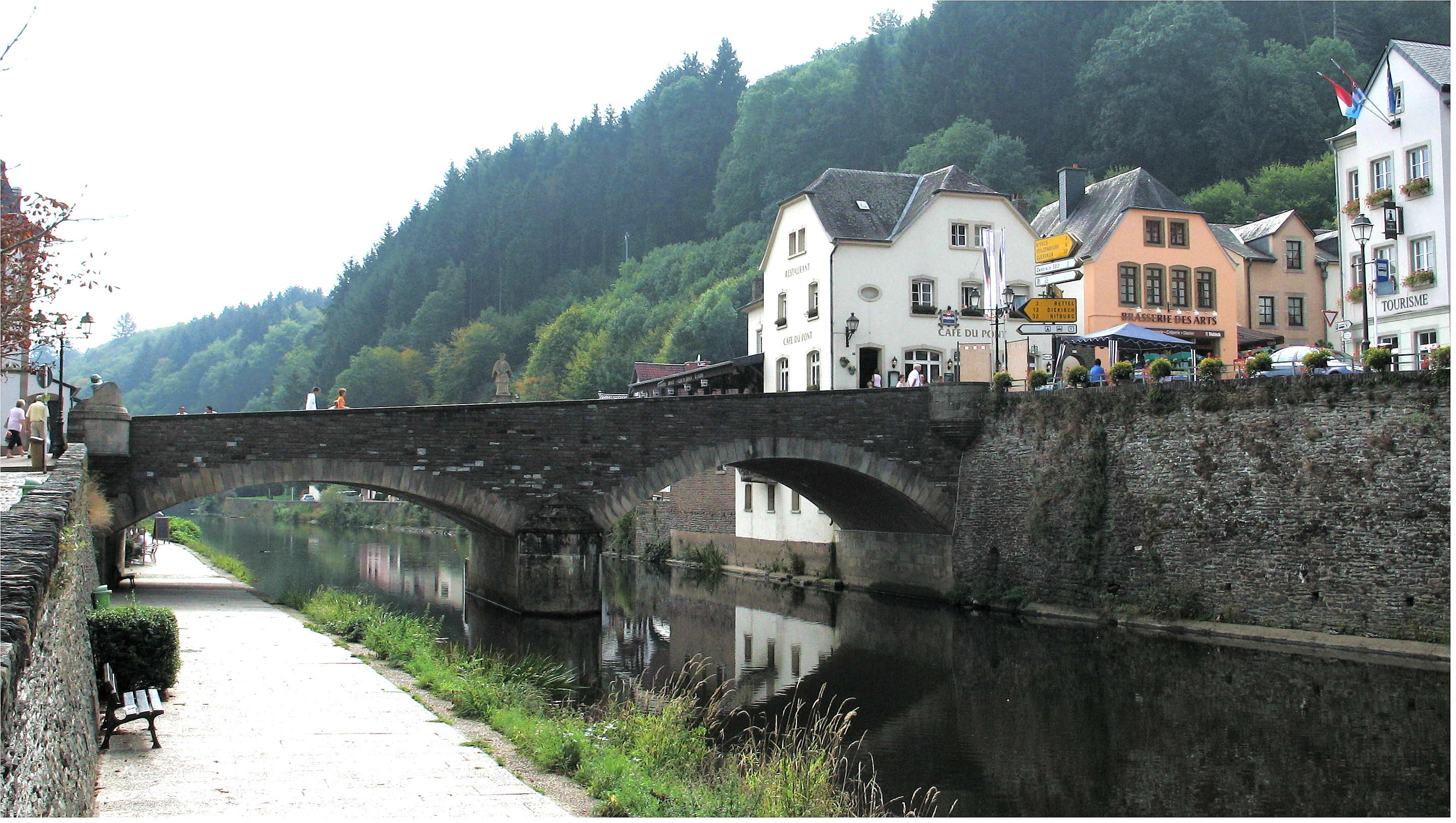 D'Our zu Veianen